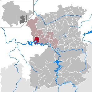 Wilhelmsdorf in Thuringia - Saale-Orla-Kreis